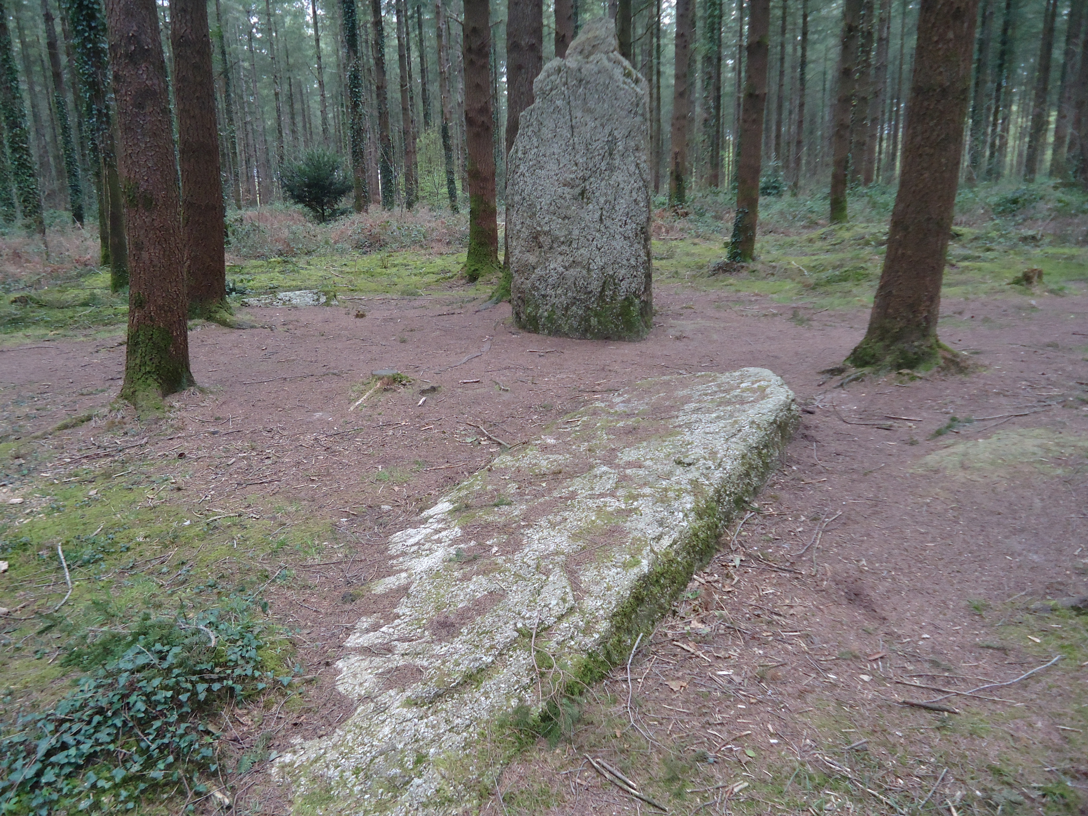 Menhir Men Bras dans la forêt de Camors